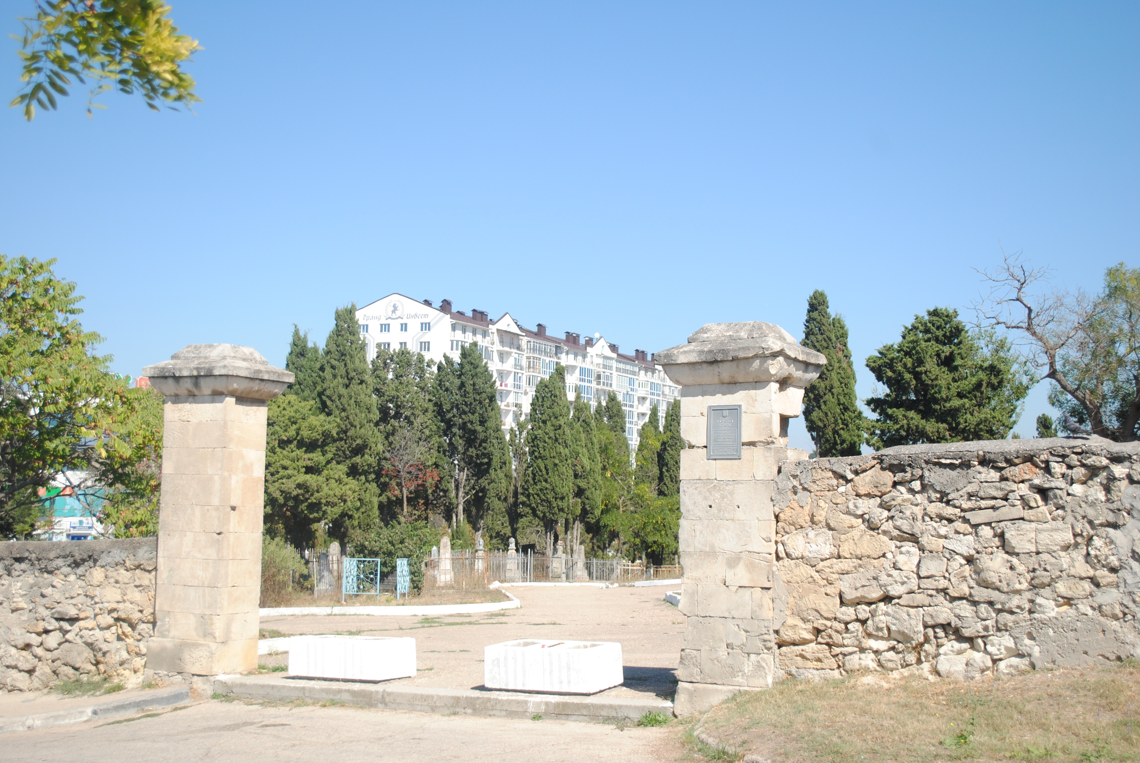 Старое городское кладбище: улица Пожарова, 9, Ленинский район, Севастополь This object is located on the Crimean Peninsula and recognized as cultural heritage by both Russia and Ukraine under the monument ID: 9230109000/ 85-366-9234, respectively. The legal status of the Crimean region is currently disputed.